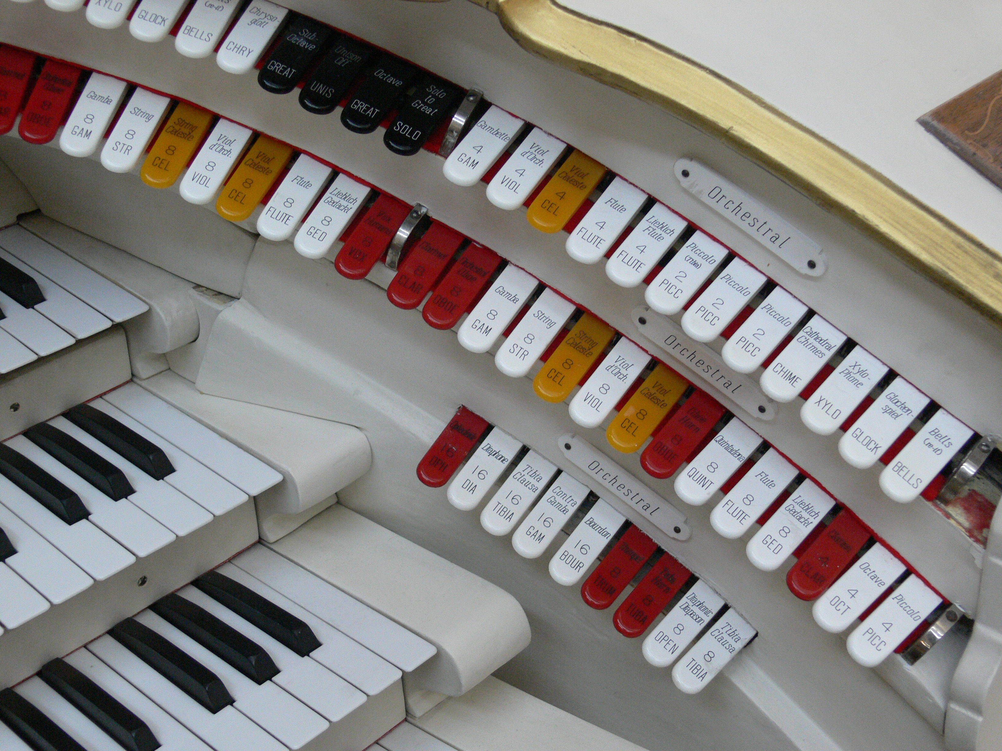 Mighty Wurlitzer, Musikinstrumenten-Museum Berlin Console